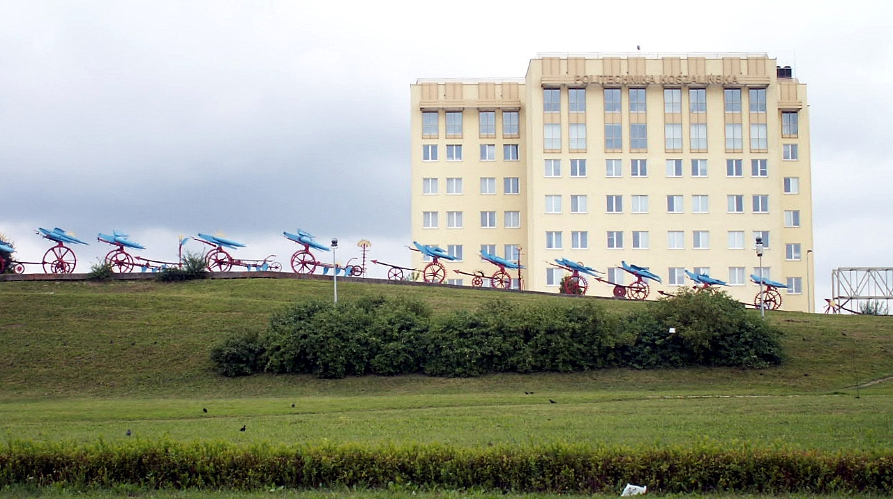 Rzeźba plenerowa "Płomienne ptaki" w Koszalinie - autorstwa Władysława Hasiora; w tle Politechnika Koszalińska